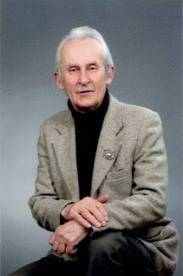 Калиновський Григорій Миколайович — академік АН вищої школи України